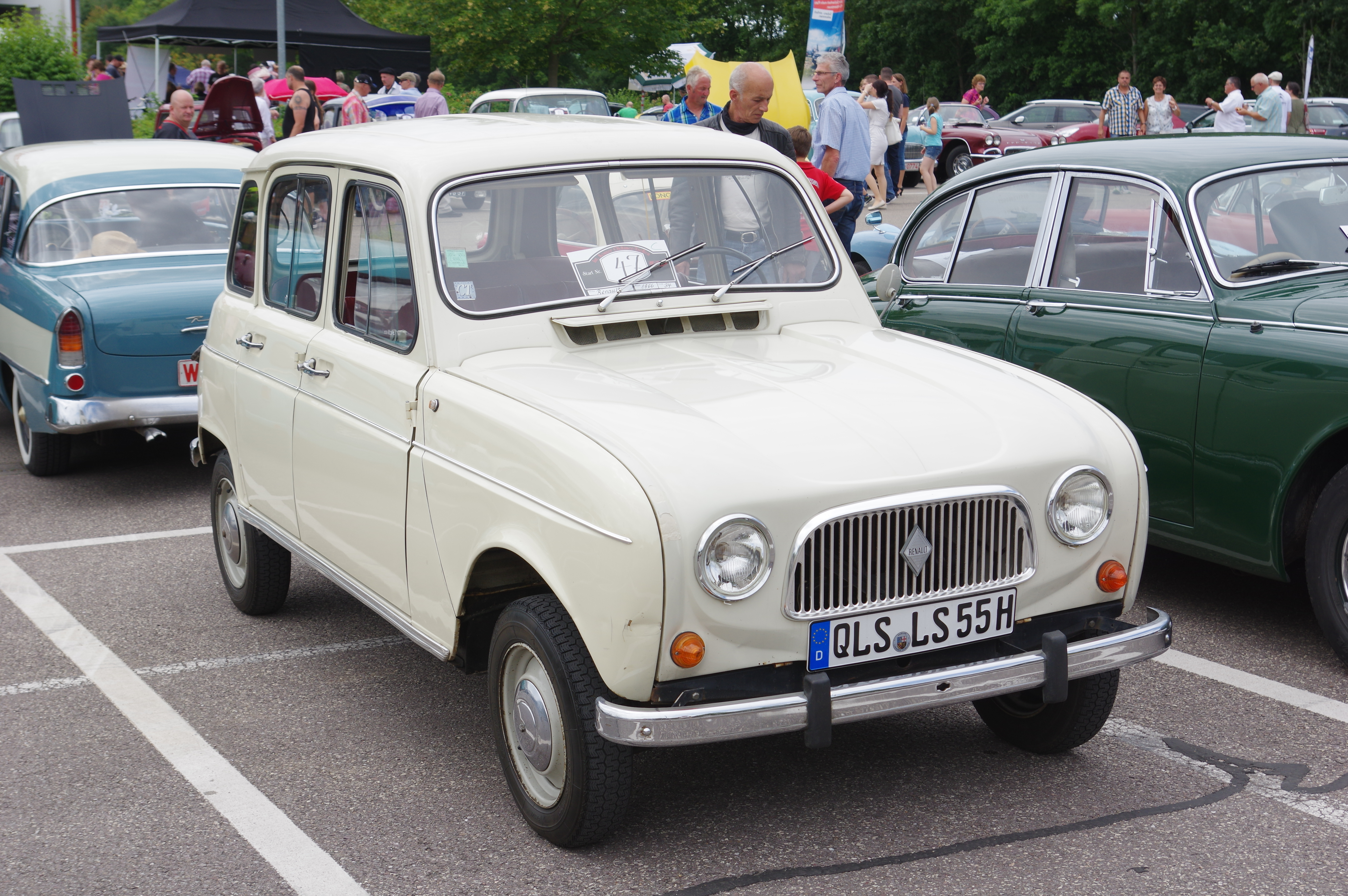 Renault 4, 1966, 34 PS, 32. Internationales Oldtimer Treffen Konz 2016, Das Nummernschild ist verfälscht!